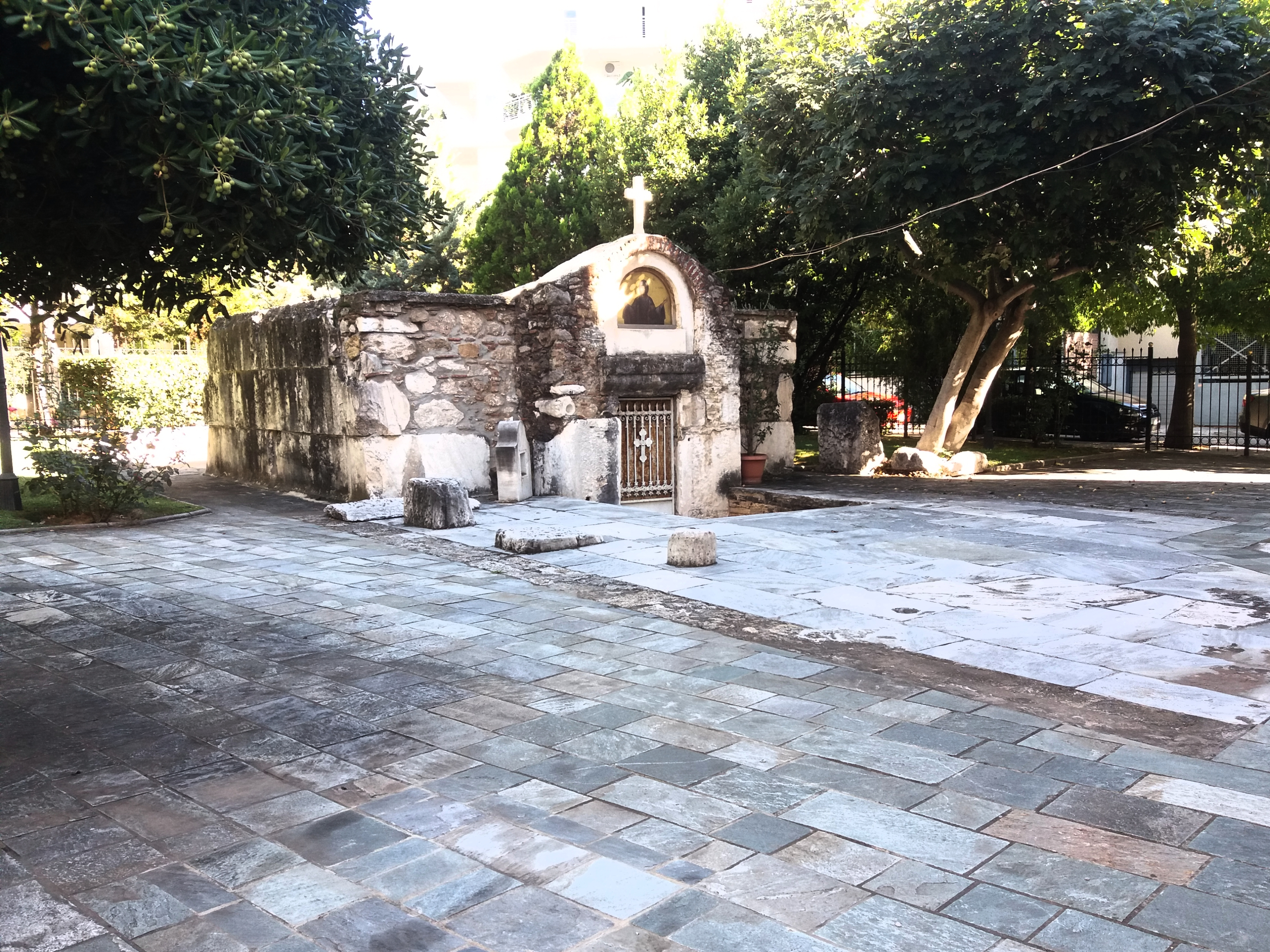 Παναγιά Μαρμαριώτισσα«Παναγιά Μαρμαριώτισσα»